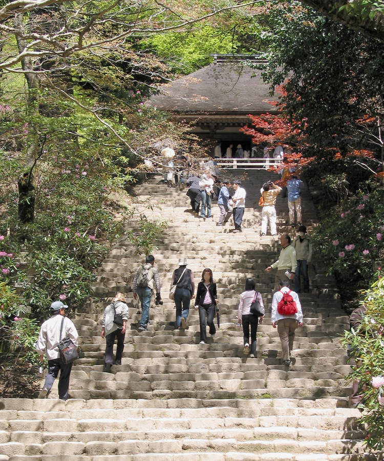 Yoroizaka of Murouji at Uda, Nara, Japan. 真言宗室生寺派大本山室生寺の鎧坂奈良県宇陀市室生区で撮影